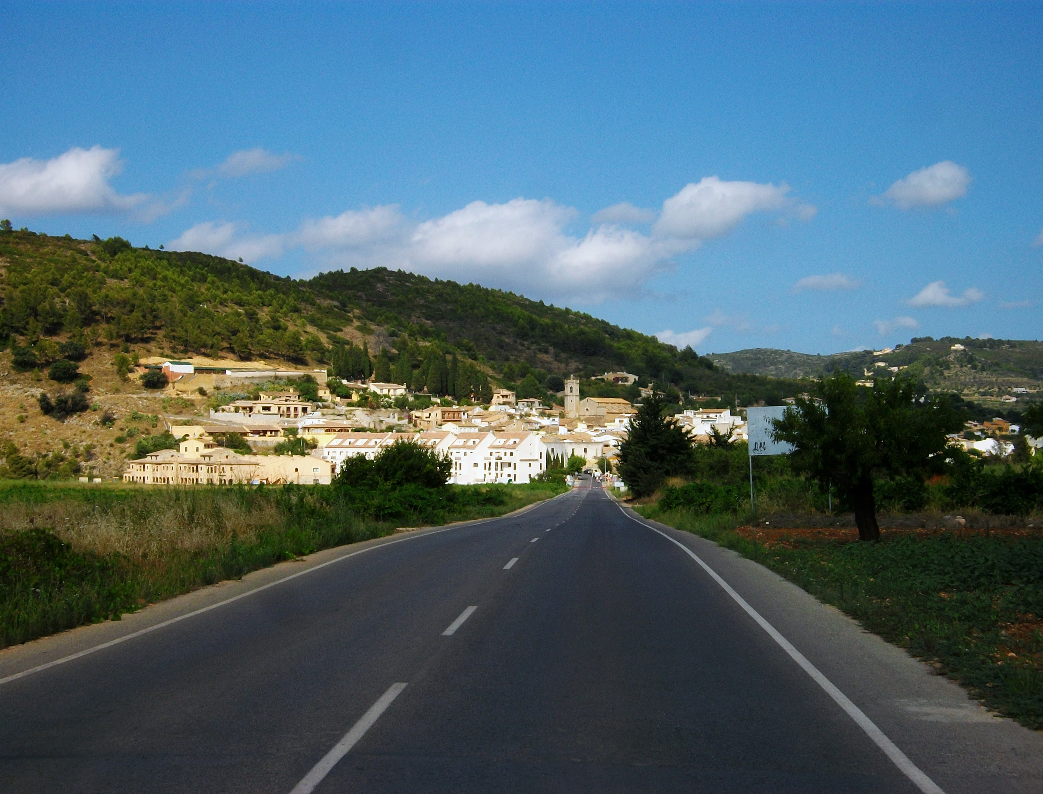 Llíber, a la vall del Pop, Marina Alta.